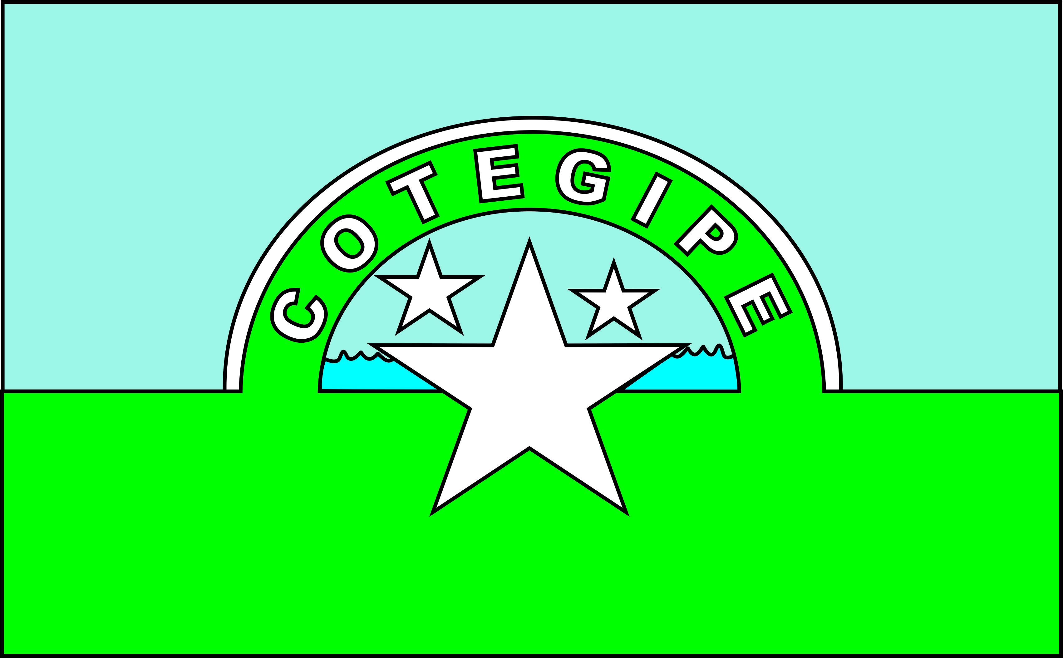 Bandeira de Cotegipe Brazil